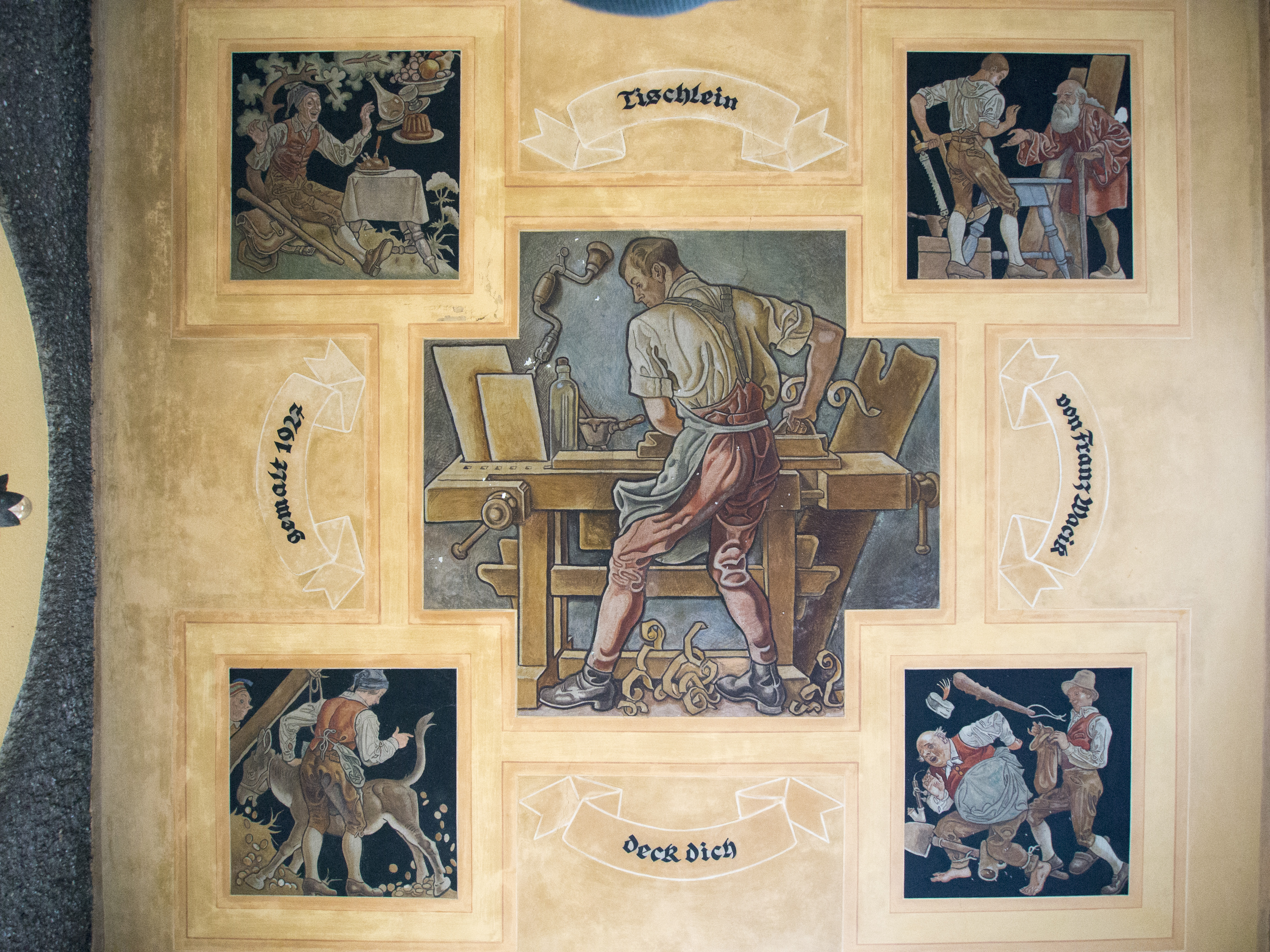 Vogelweidhof This media shows the Vienna residential building (Gemeindebau) with the ID 184.